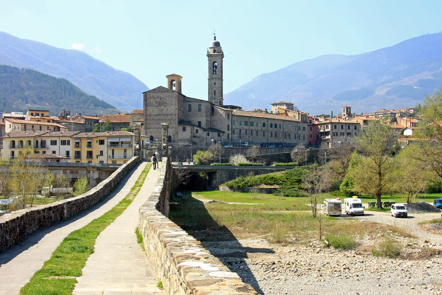 Panorama di Bobbio (PC) dal Ponte Vecchio